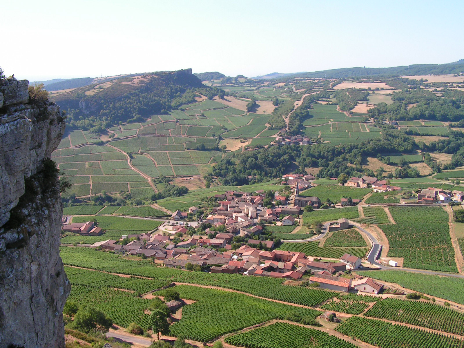 Vergisson, splendide village viticole de la Saône-et-Loire (Bourgogne, France)